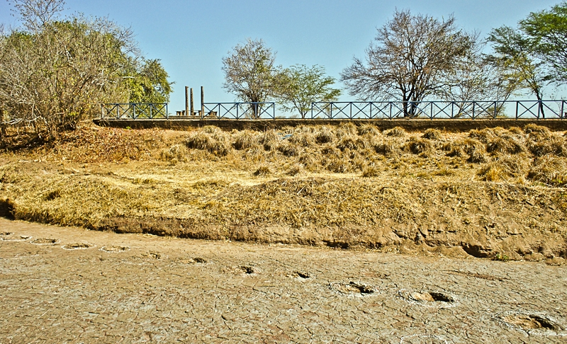 Sertão